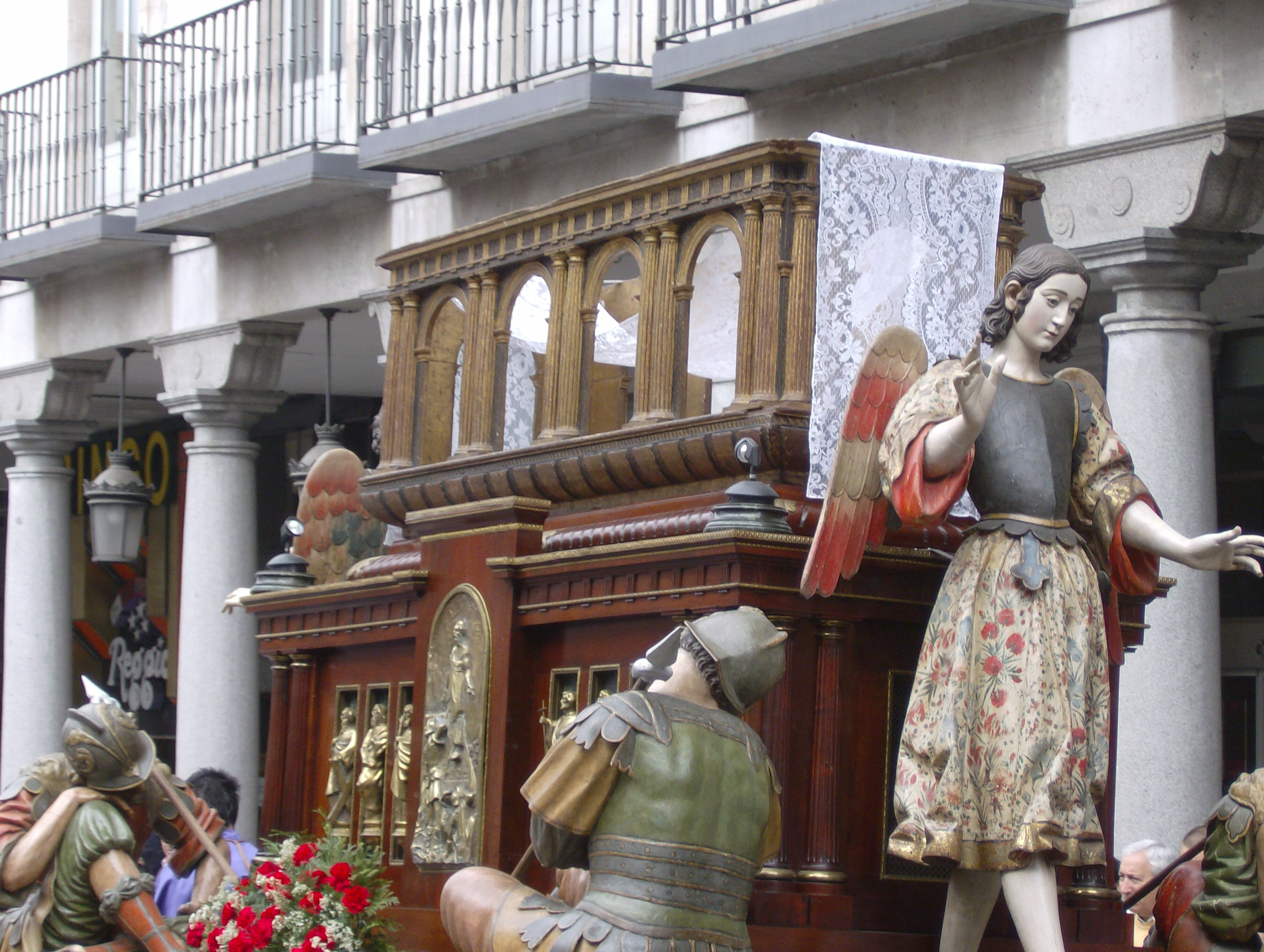 Santo Sepulcro vacio (Alonso y Jose de Rozas), Valladolid